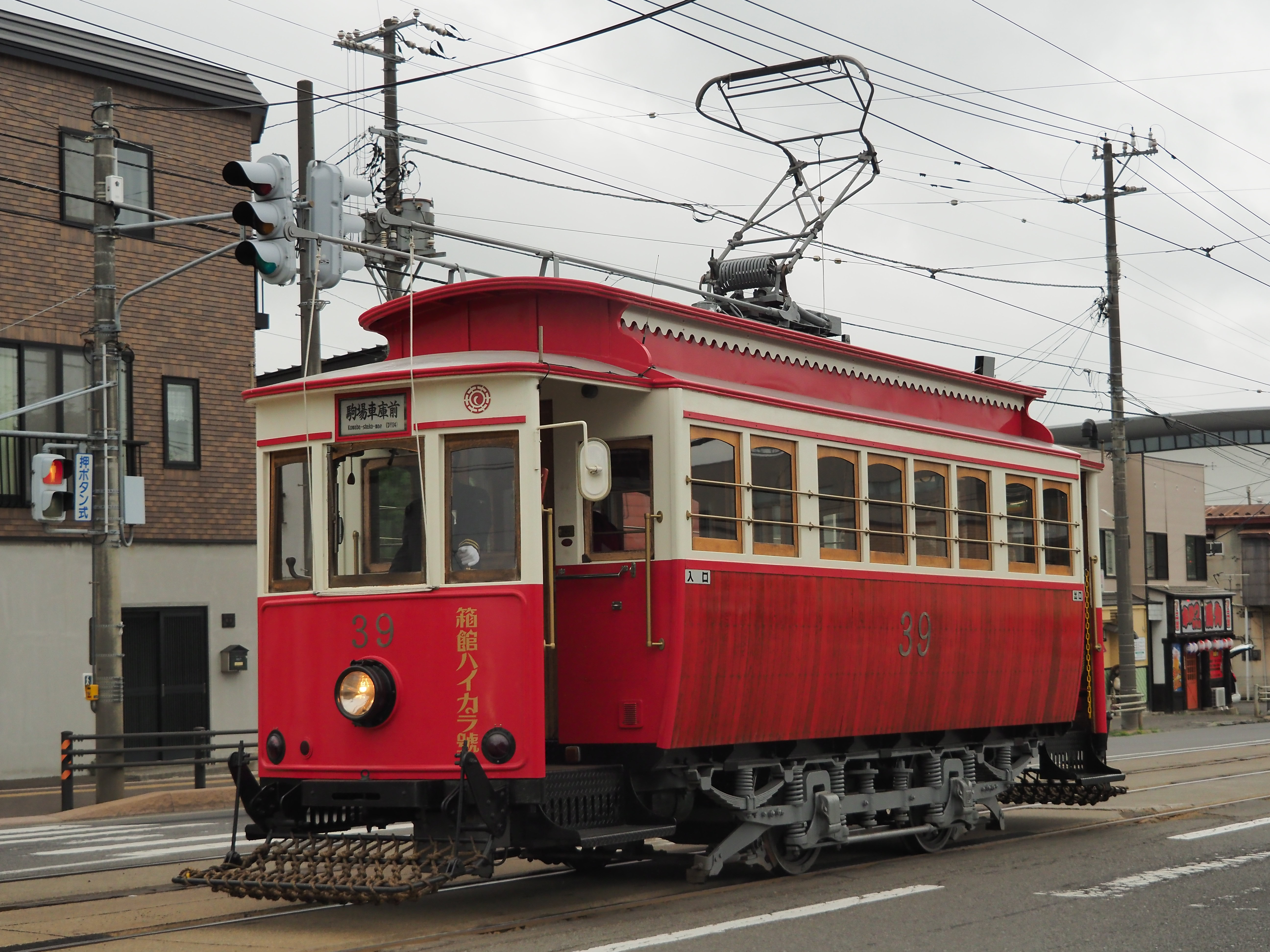 函館市電の復元チンチン電車『箱館ハイカラ號』